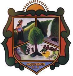 Escudo del municipio